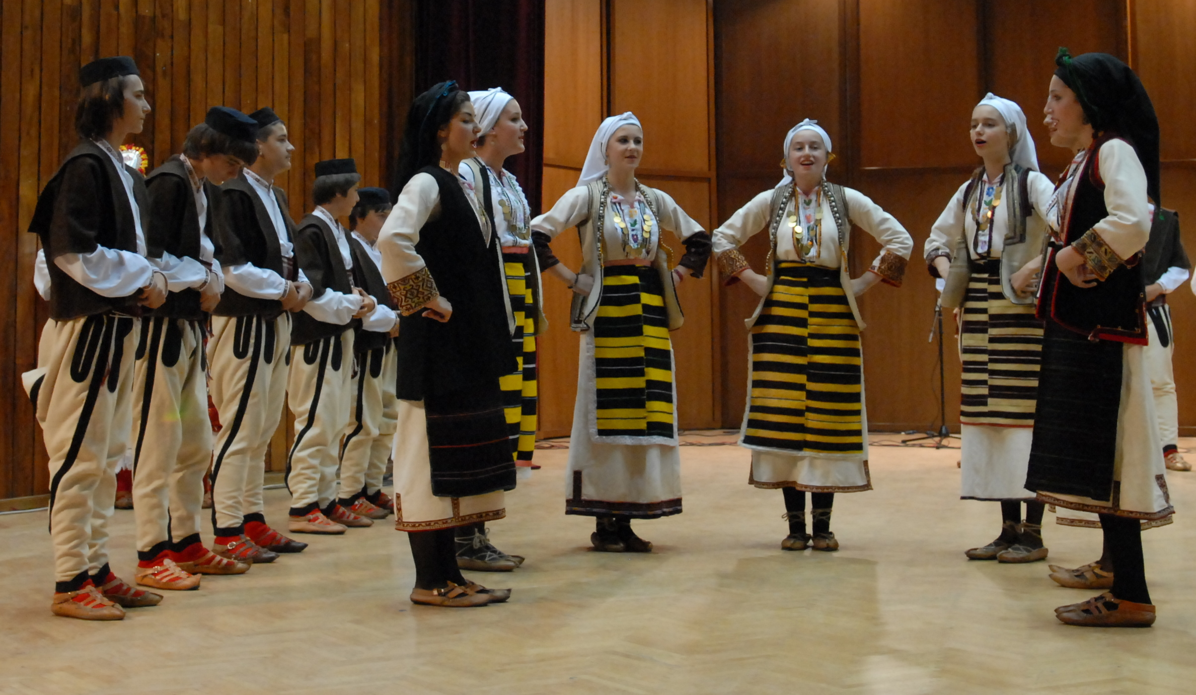 "Копачија" - игри од кичевскиот крај